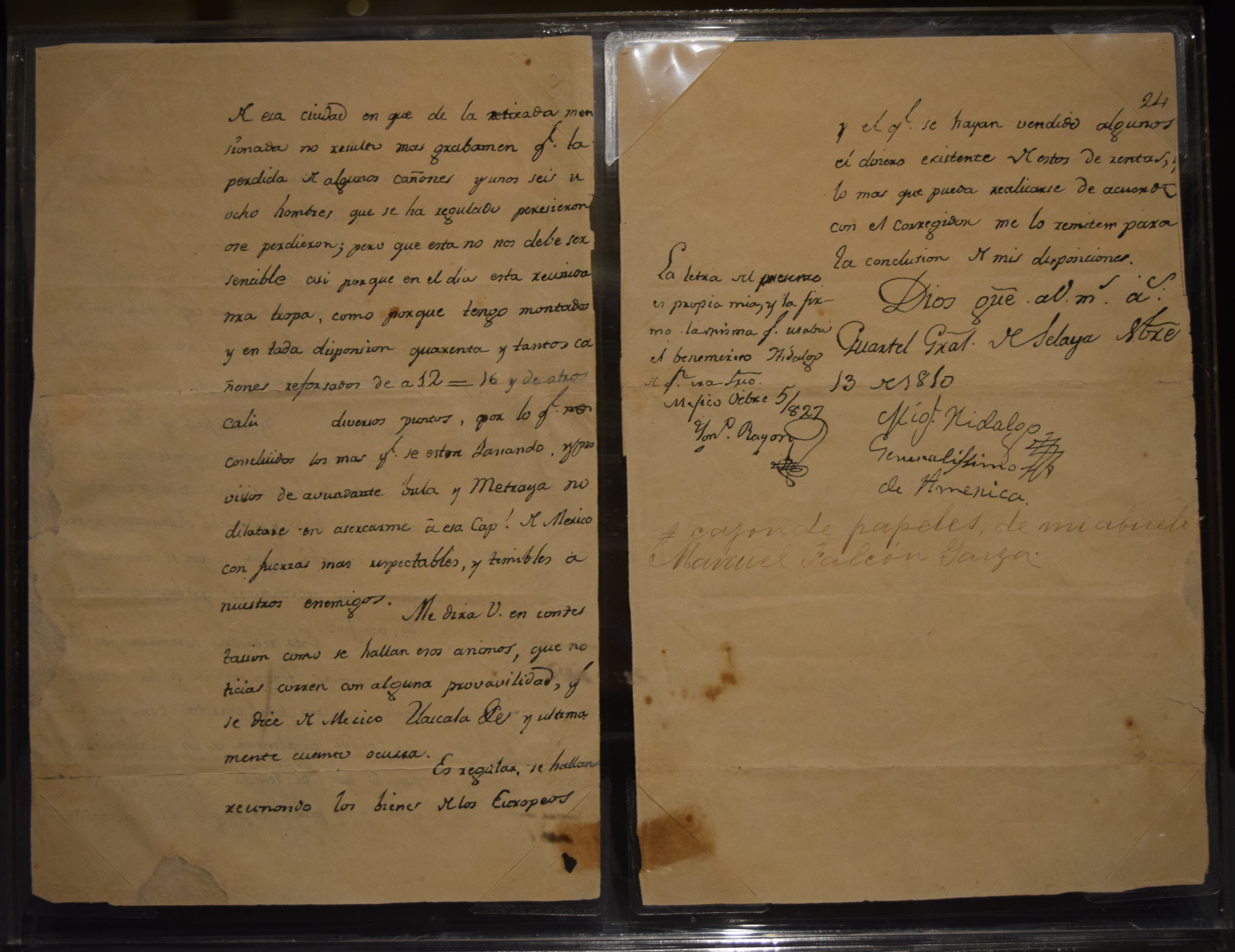 (Tlalpujahua, Michoacán, México, 1773 – Ciudad de México, México, 1832) Miguel Hidalgo y Costilla (Pénjamo, Guanajuato, México, 1753 – Chihuahua, Chihuahua, México, 1811) Misiva que da la explicación de evitar el ataque a la Ciudad de México Cuartel General de Celaya, Guanajuato, México, 13 de noviembre de 1810 Fondo: DCLVIII Carpeta: 1 Documento: 3